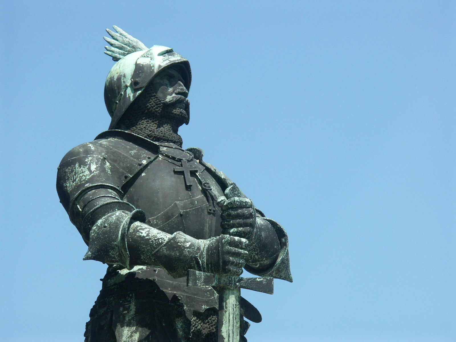 Hunyadi János szobra - Budán, Tóth István (1861-1934) alkotása 1903-ból.